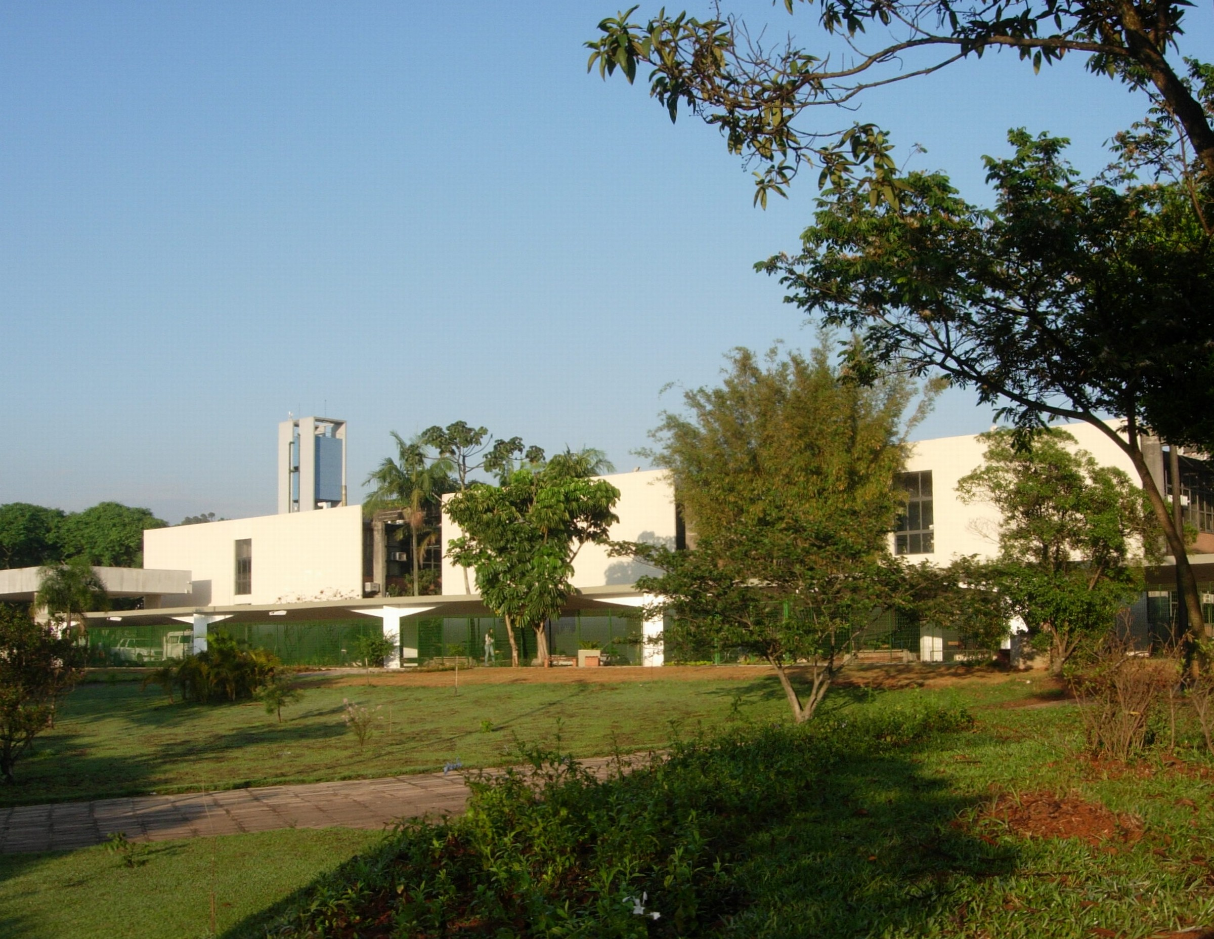 Instituto de Química - Universidade de São Paulo, Av. Prof. Lineu Prestes, 748, SP, Brasil